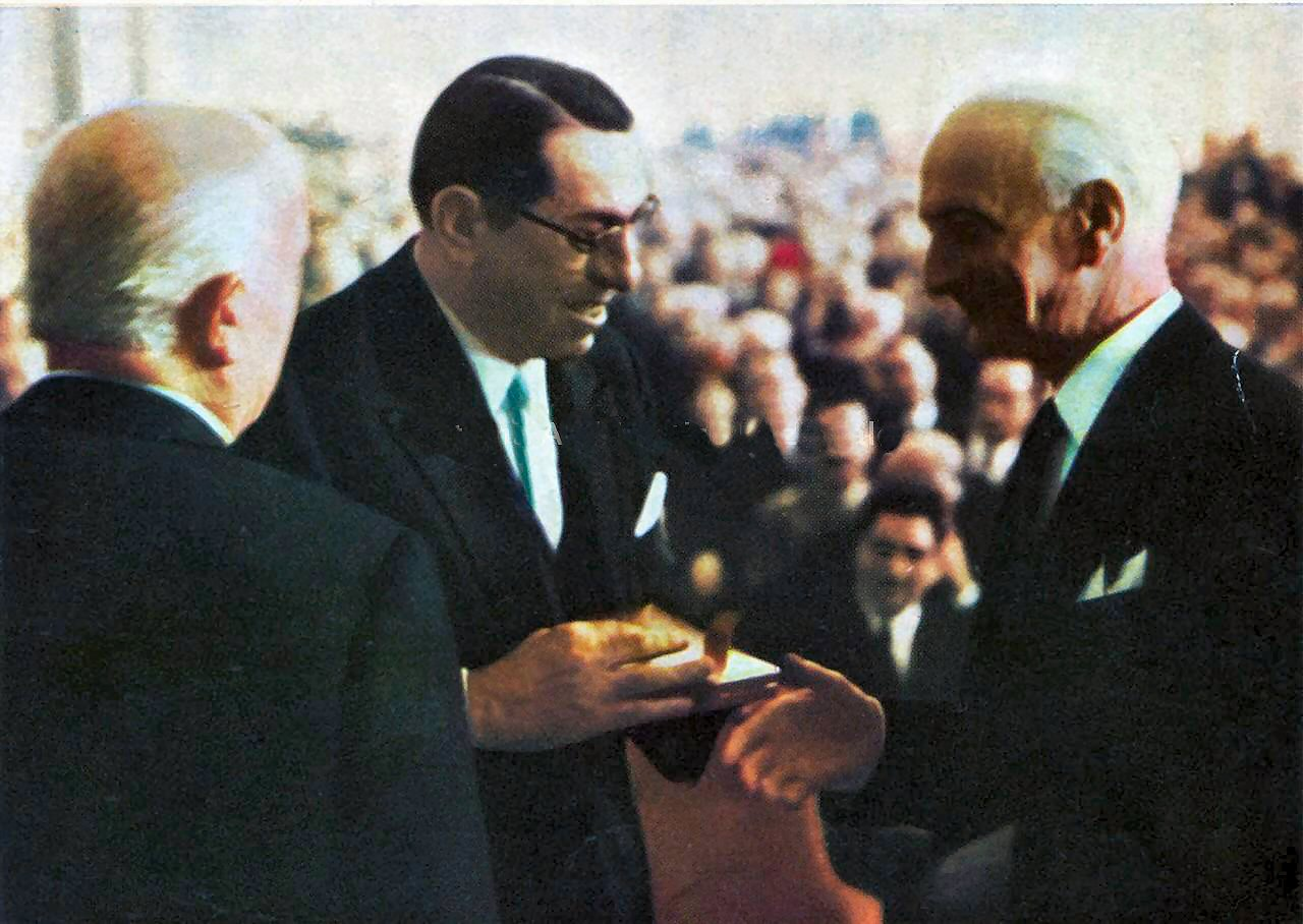 Francesco Cassani riceve la nomina a cavaliere del lavoro